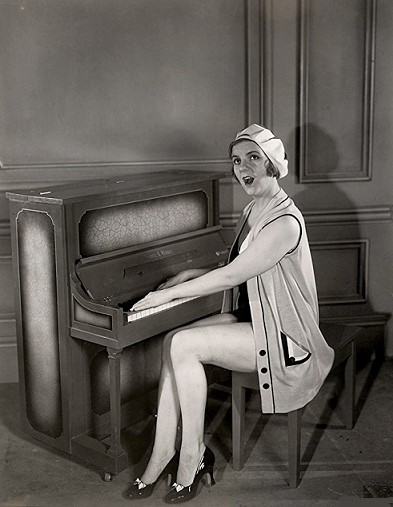 Winnie Lightner, foto di scena del film "Gold Dust Gertie"